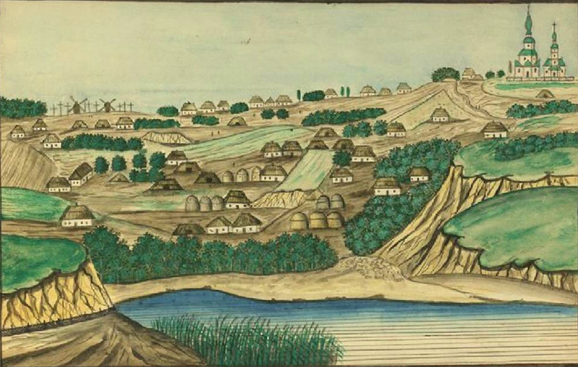 Обухів. Домінік П'єр де ля Фліз. «Медико-топографічний опис... Київської округи...». Київ, 1854. - с. 610